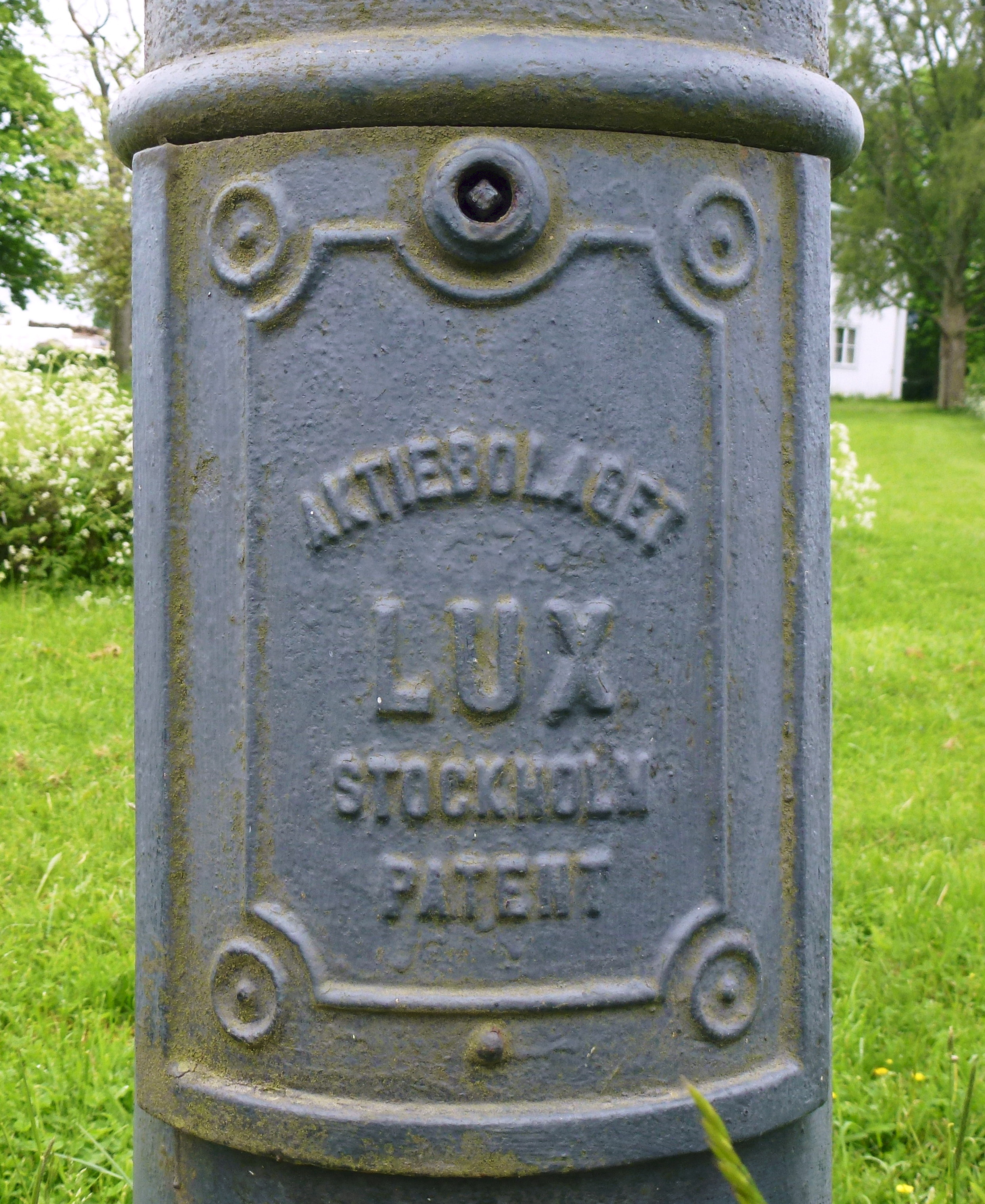 "Aktiebolaget Lux Stockholm Patent" på en lyktstolpe